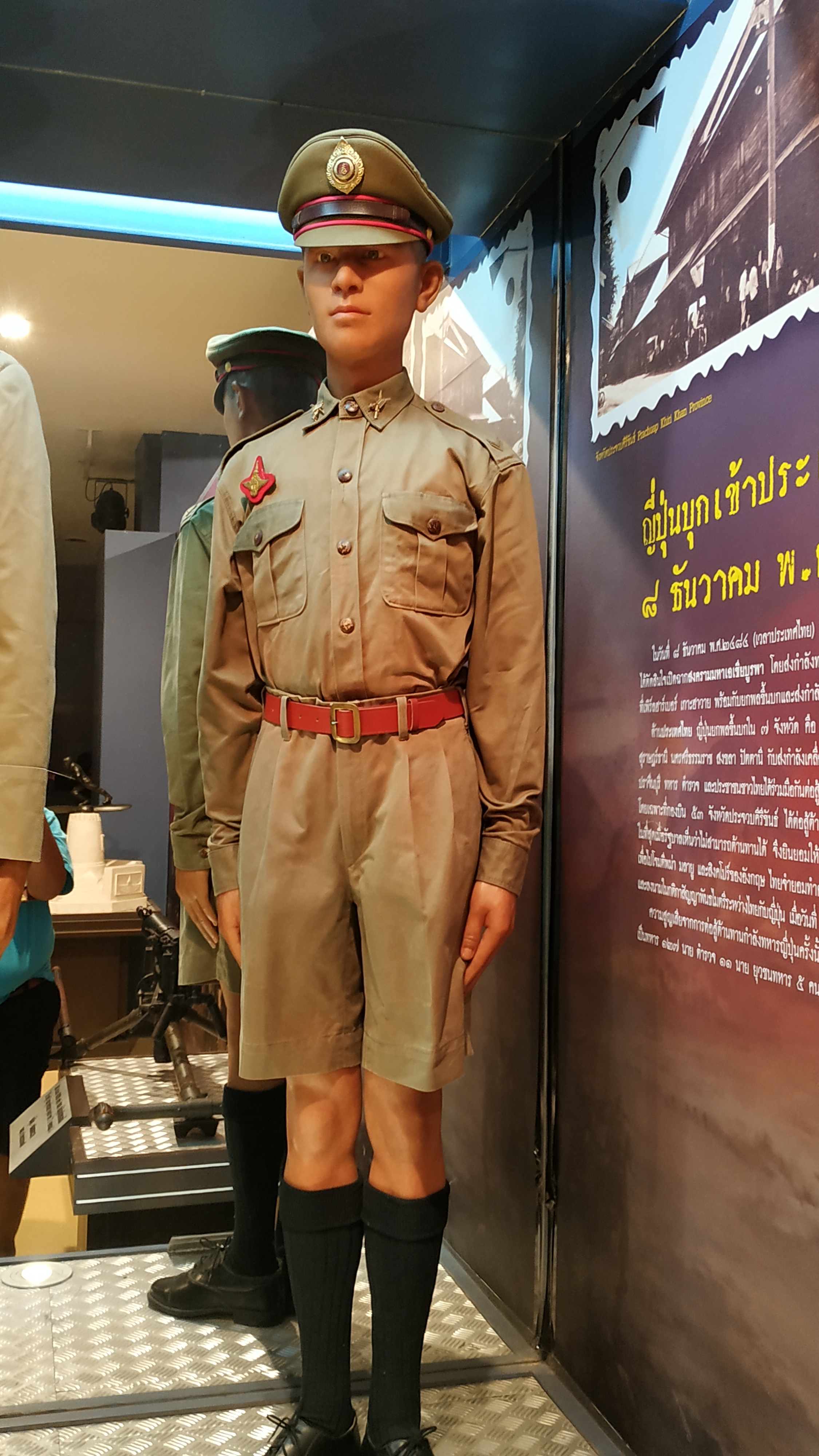 ประติมากรรมลอยตัวรูปเยาวชนไทยในเครื่องแบบยุวชนทหารสมัยสงครามโลกครั้งที่ 2 จัดแสดงในส่วนนิทรรศการประวัติศาสตร์ไทยในสมัยสงครามโลกครั้งที่ 2 ณ อาคารอนุสรณ์สถานแห่งชาติ ตำบลคูคต อำเภอลำลูกกา จังหวัดปทุมธานี